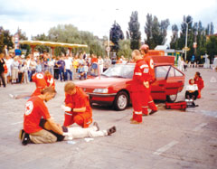 Pokaz ratownictwa w Tomaszowie Maz.